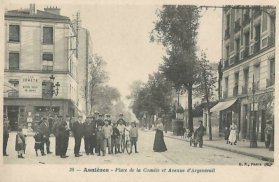 Asnières-sur-Seine.Place de la Comète.Avenue d'Argenteuil